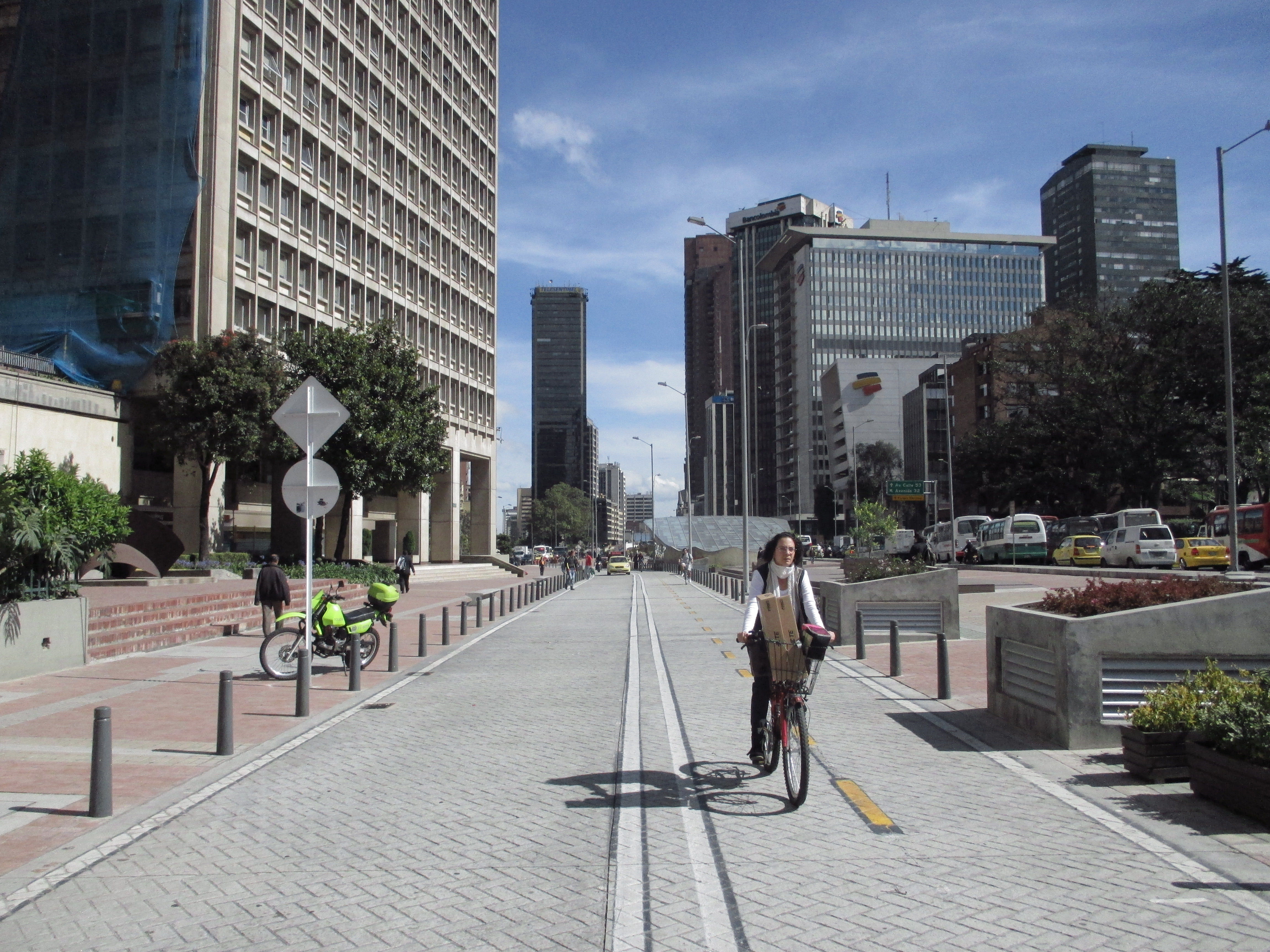 Centro Inernacional Ciclorruta cl 10